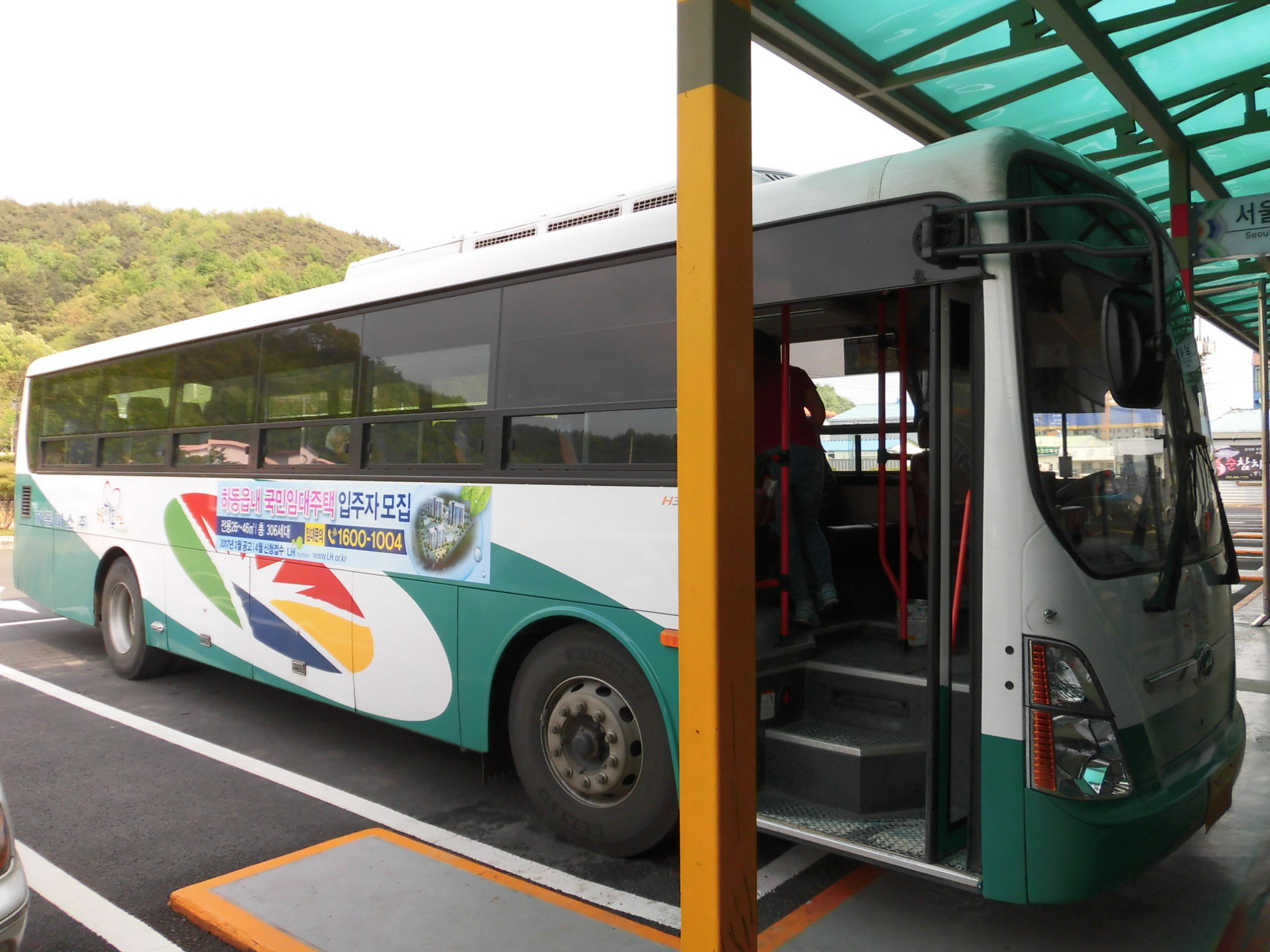 하동버스(진교버스터미널에서 촬영)